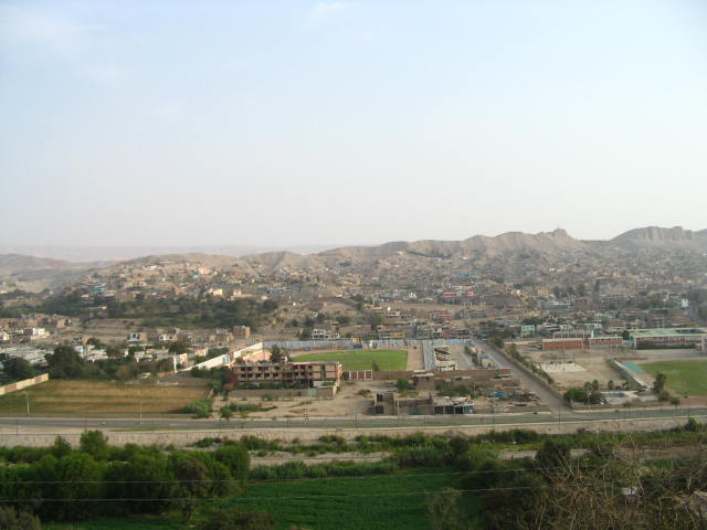 Vista Panorámica de Moquegua